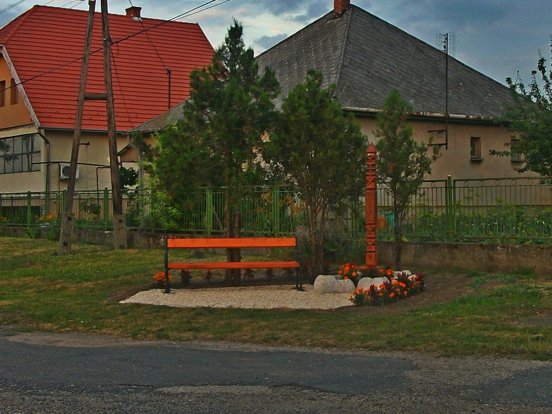 Lenkey kopjafa Zichyújfaluban.